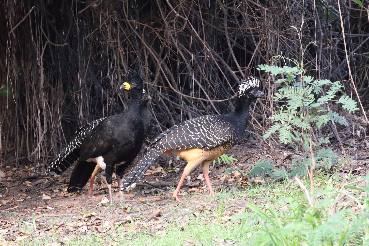 Hocco à face nue, Pantanal (Brésil)